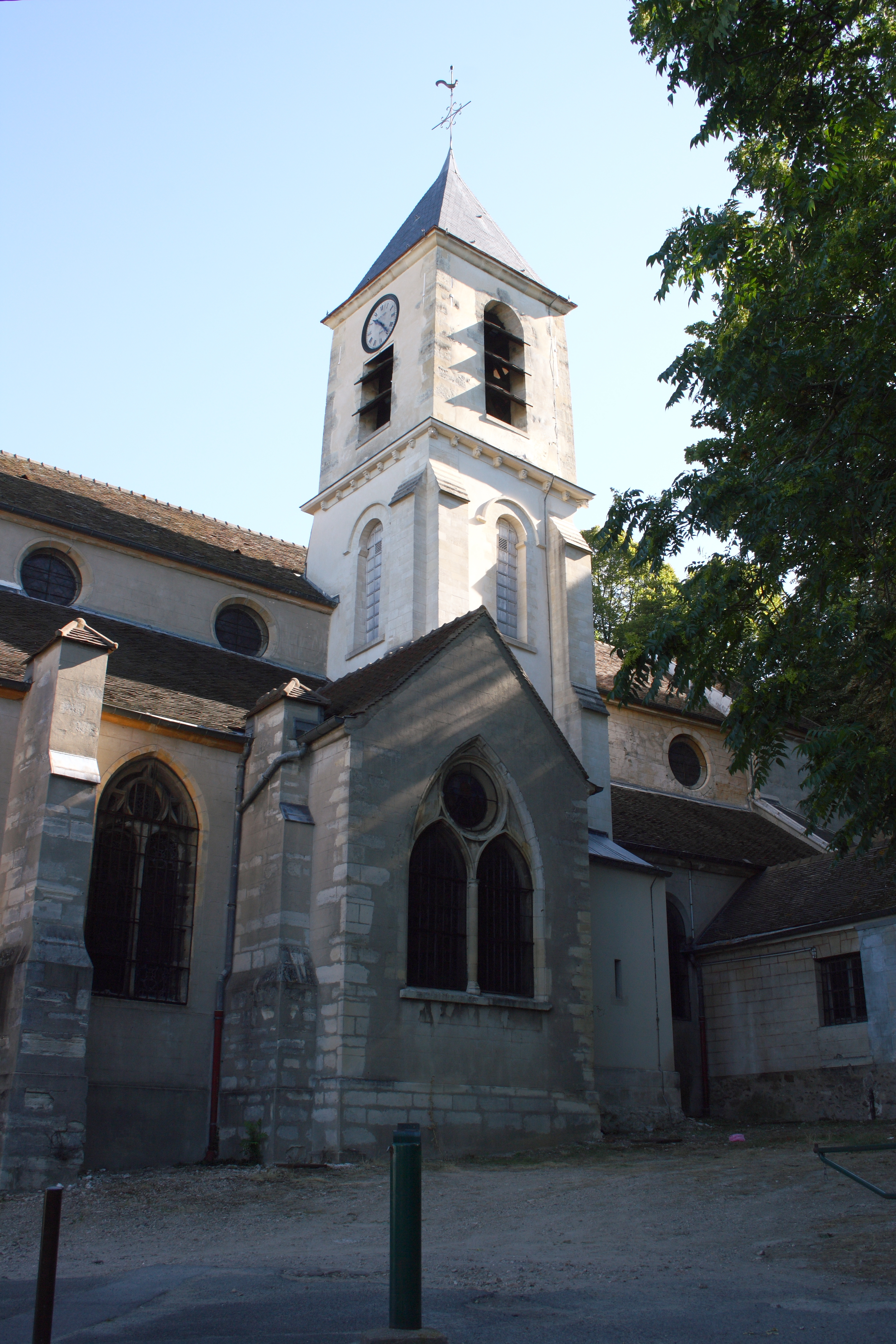 Kirche Saint-Georges in Villeneuve-Saint-Georges im Département Val-de-Marne (Île-de-France)